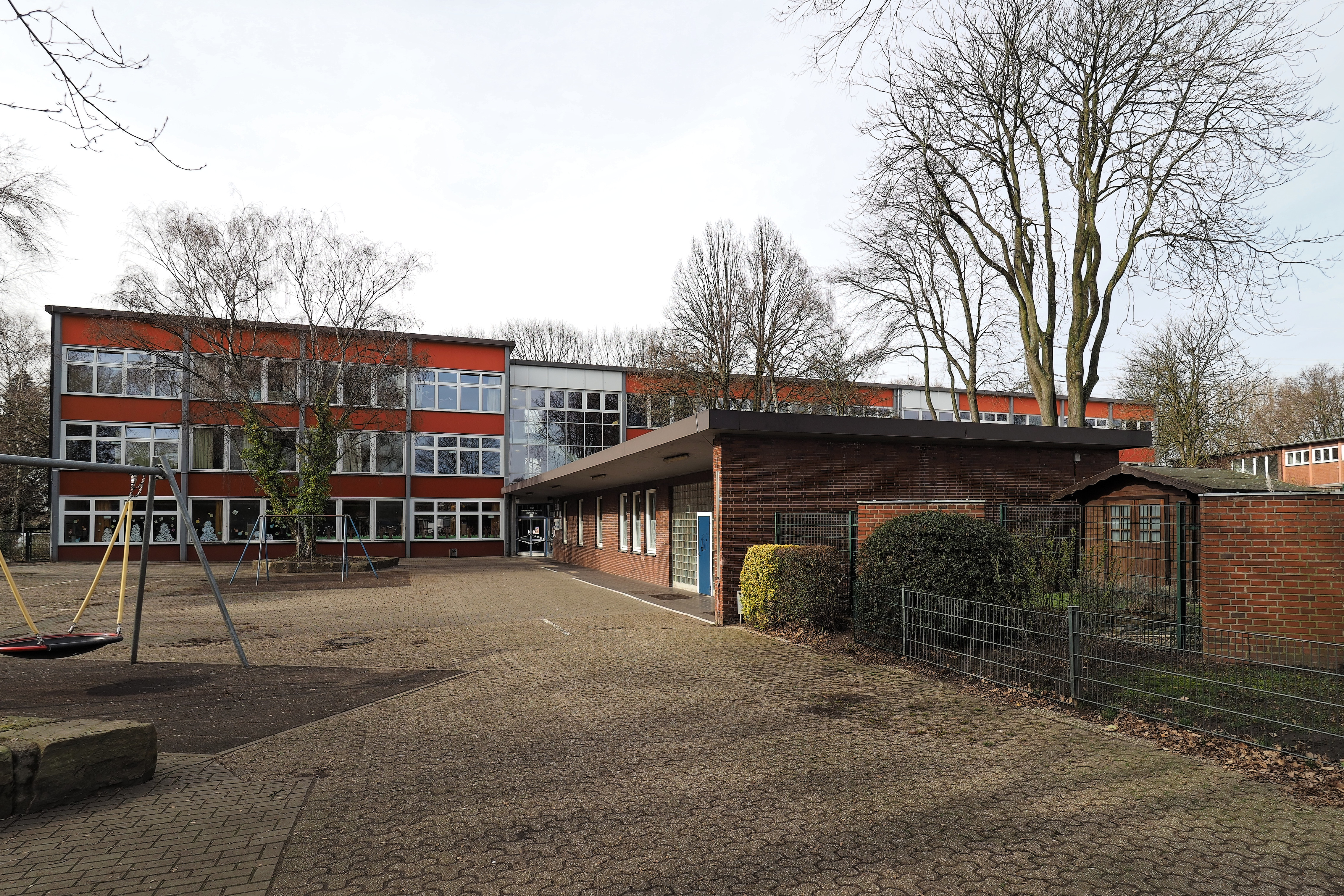 Die Grundschule der Siedlung Pantringshof in Herne-Pantringshof, Eberhard-Wildermuth-Straße, in den Gebäuden befindet sich auch die Erich-Kästner-Grundschule.